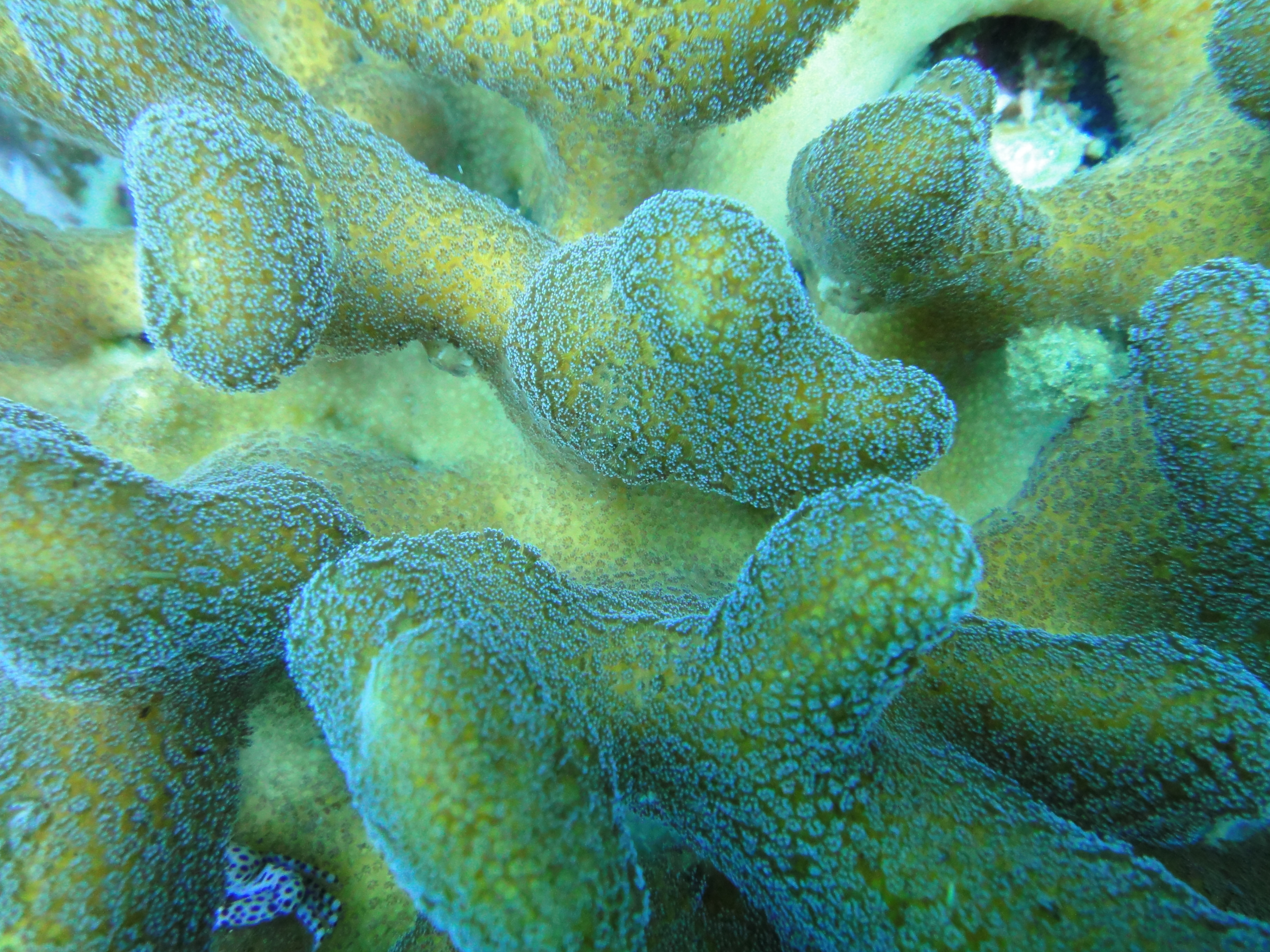 Colonia de Seriatopora caliendrum, Cebú, Filipinas